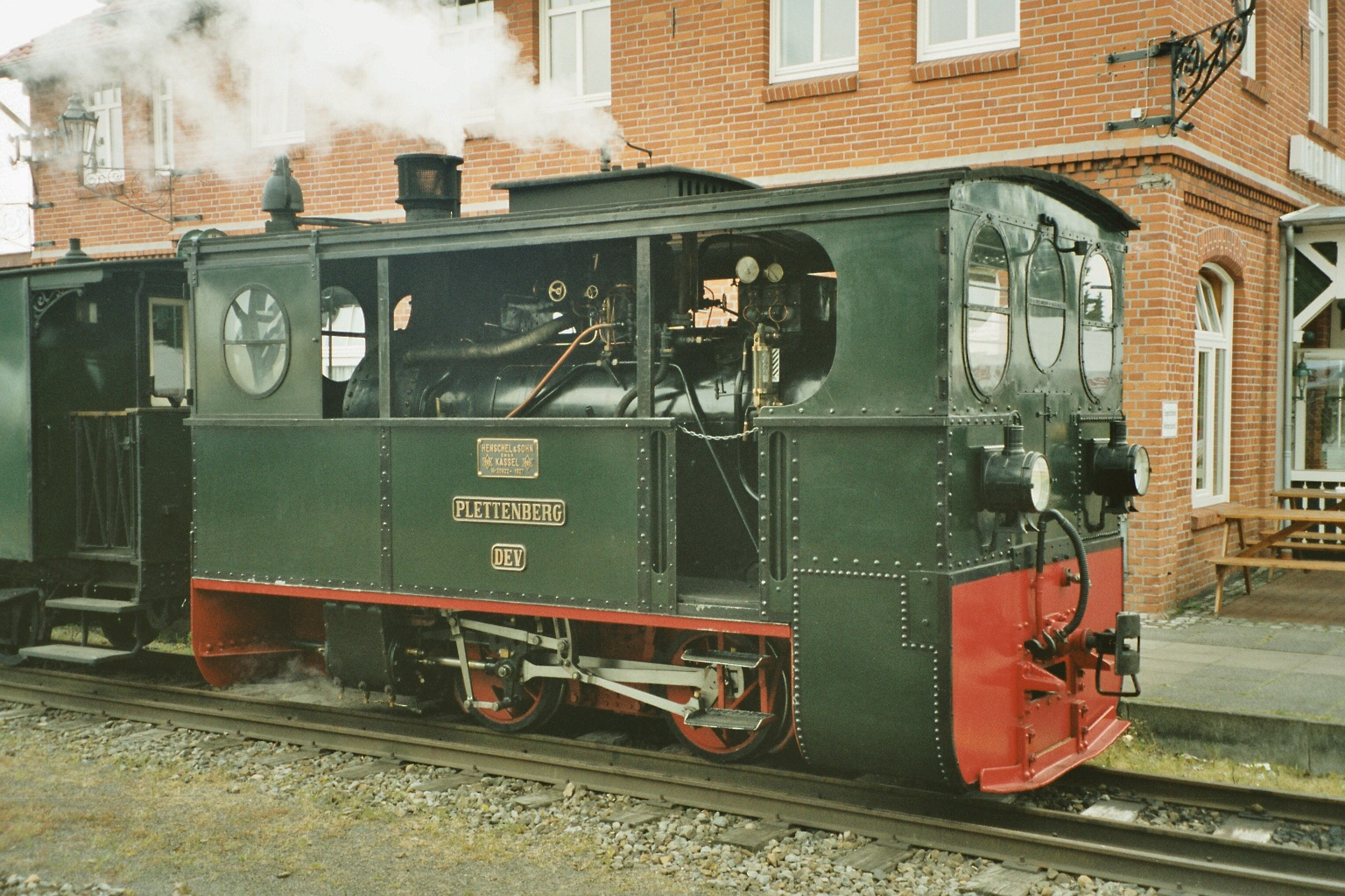 Lok Plettenberg im Bahnhof Bruchhausen der Museumseisenbahn Bruchhausen-Vilsen - Asendorf